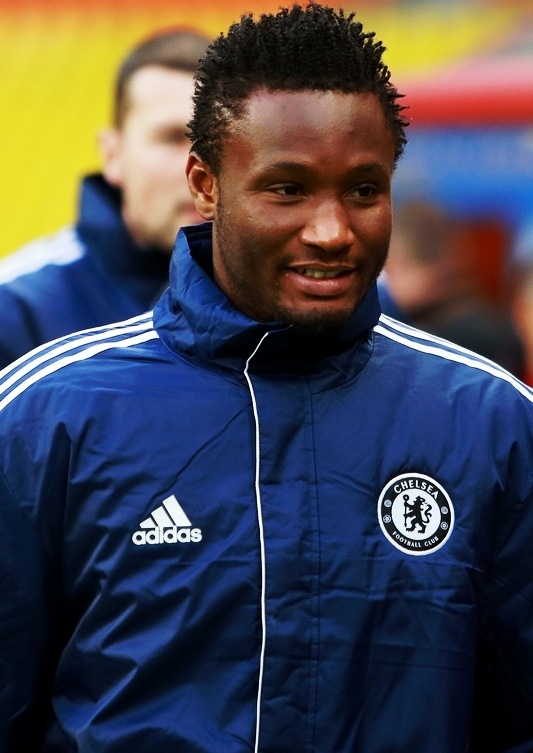 Микел игрок ФК Челси